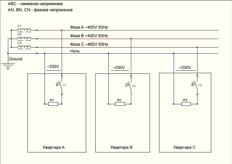 Применение трёхфазной сети на гражданских объектах